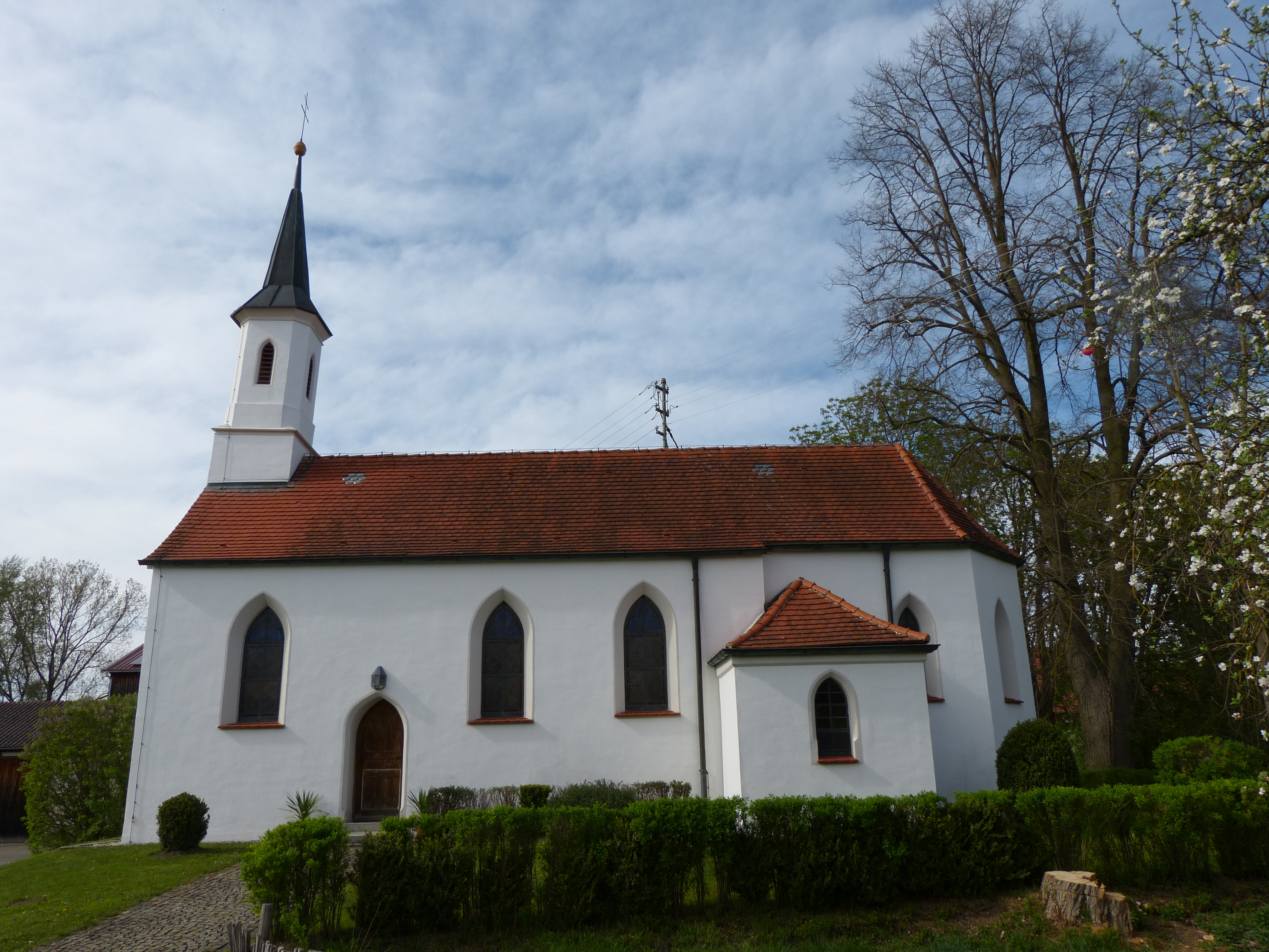 St. Anna, Weilbach, Gemeinde Pfaffenhausen, Landkreis Unterallgäu, Bayern